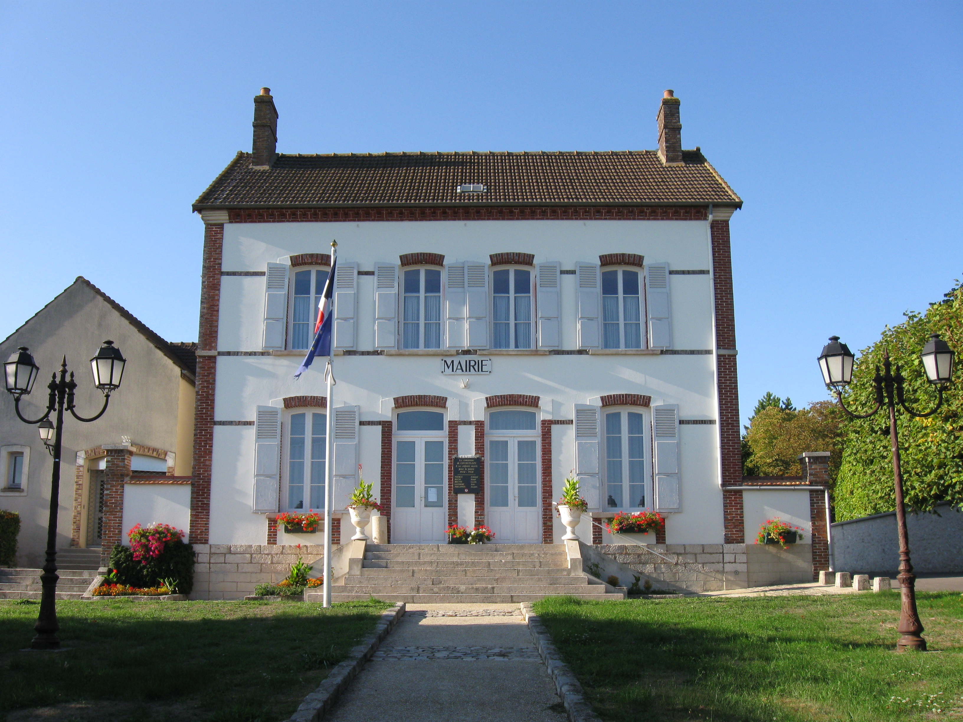 Mairie de Courcelles-en-Bassée. (Seine-et-Marne, région Île-de-France).